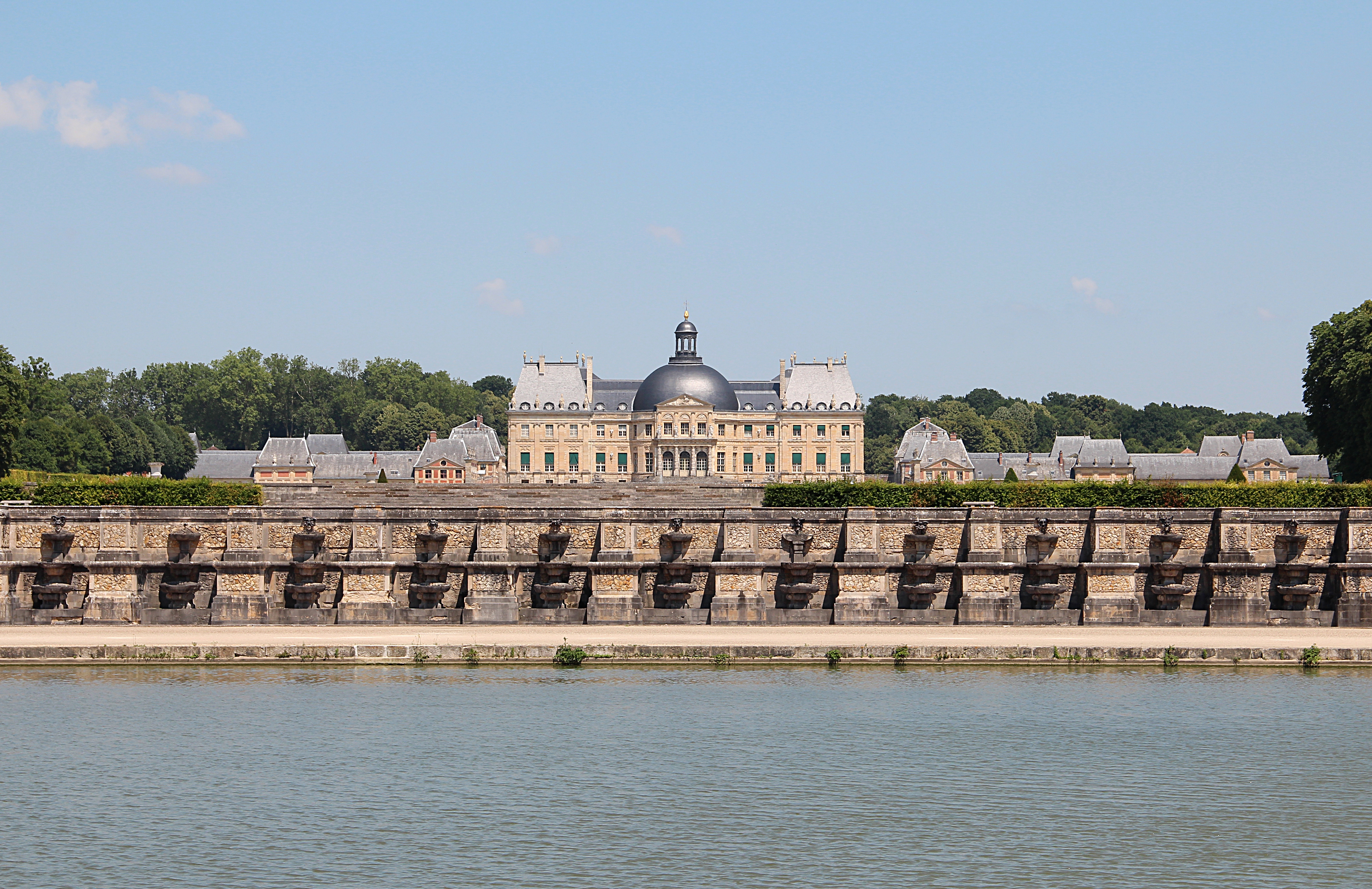 Bassin des Grandes cascades et château de Vaux-le-Vicomte - Maincy (Seine-et-Marne, France).